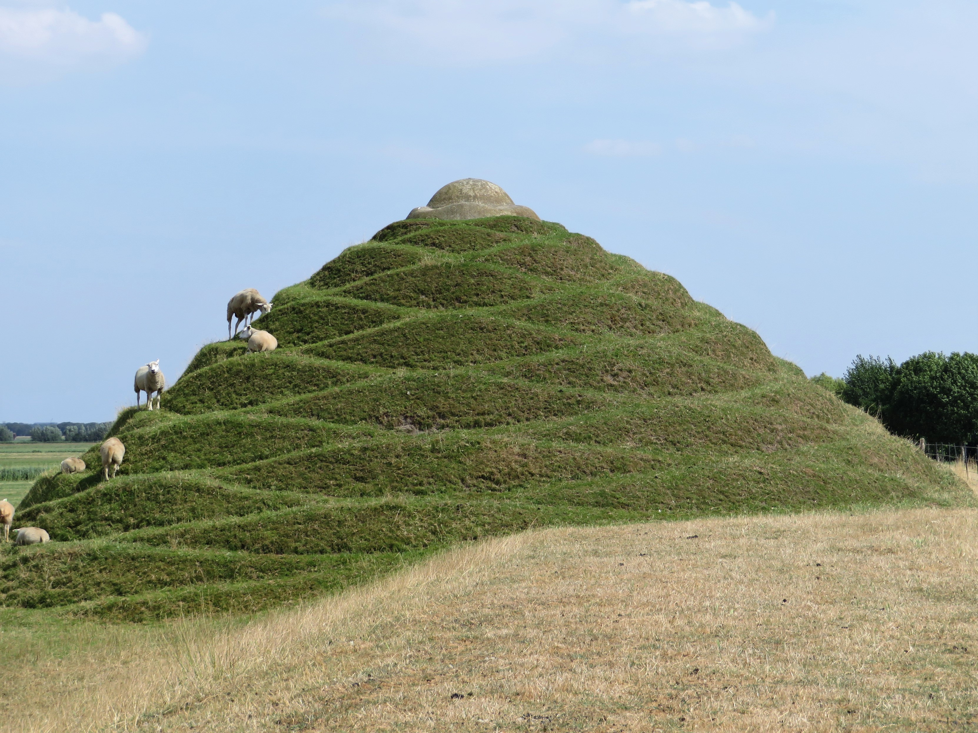 De Wachter, kunstwerk in klei en gras aan de Oostdijk in Willemstad van Marius Boender op de plaats waar in 1953 de dijk doorbrak. 2001